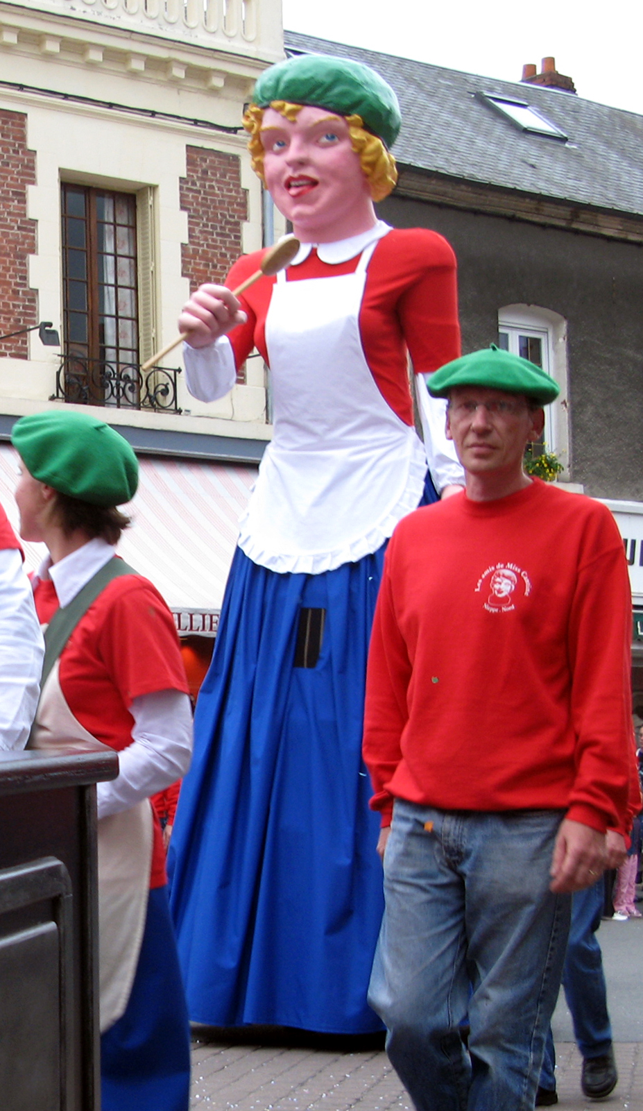 Ham (Somme, France) - Animation festive au centre-ville, un dimanche de printemps. Le géant Miss Cantine à l'angle de la rue de Noyon. .